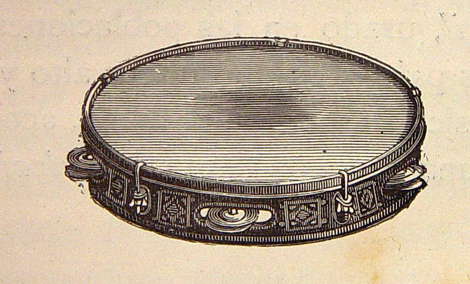 "Pandereta". Ilustraciones pertenecientes al libro : El mundo físico : gravedad, gravitación, luz, calor, electricidad, magnetismo, etc. / A. Guillemin. - Barcelona Montaner y Simón, 1882